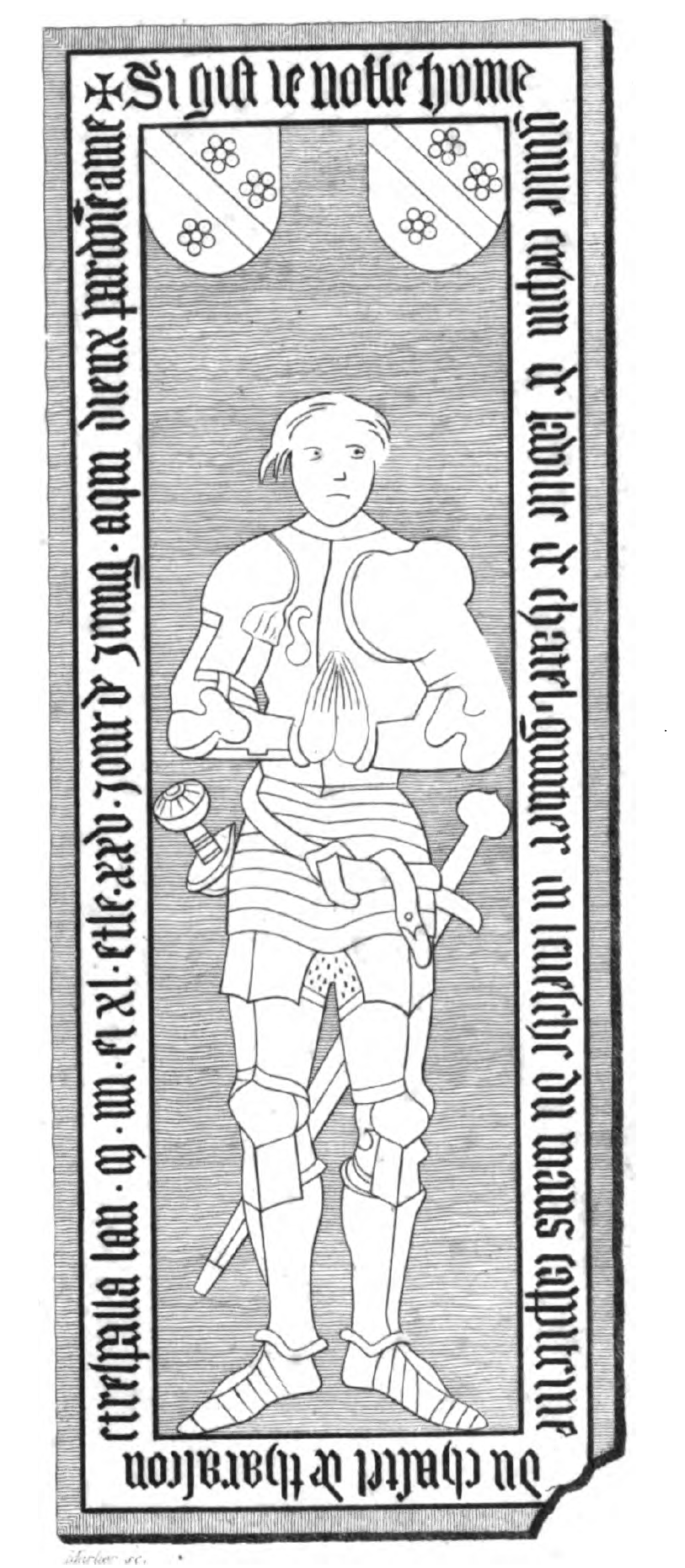 Dalle funéraire de Guillaume Crespin, Capitaine du Château du Roi René en la Collégiale Royale Sainte Marthe à Tarascon